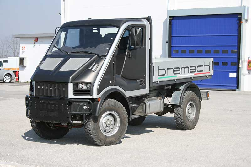 Gelände-LKW Bremach T-Rex Prototyp